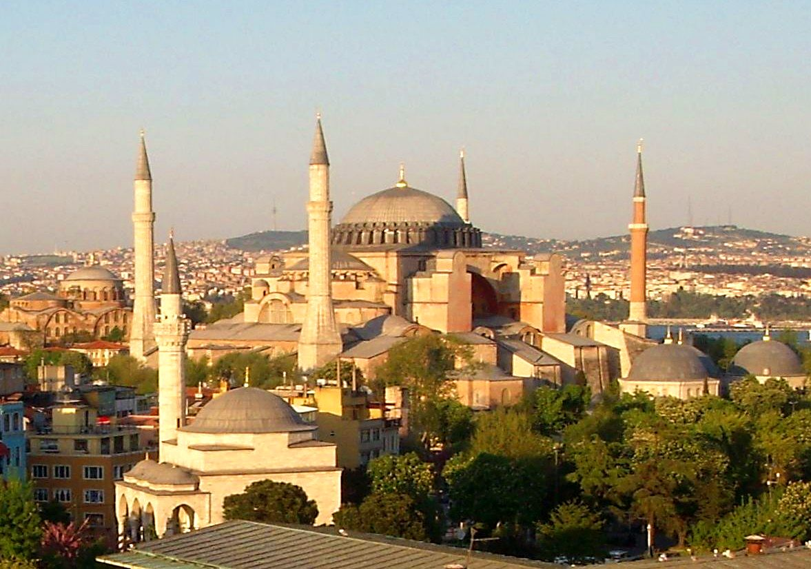 Istanbul - Santa Sofia - General